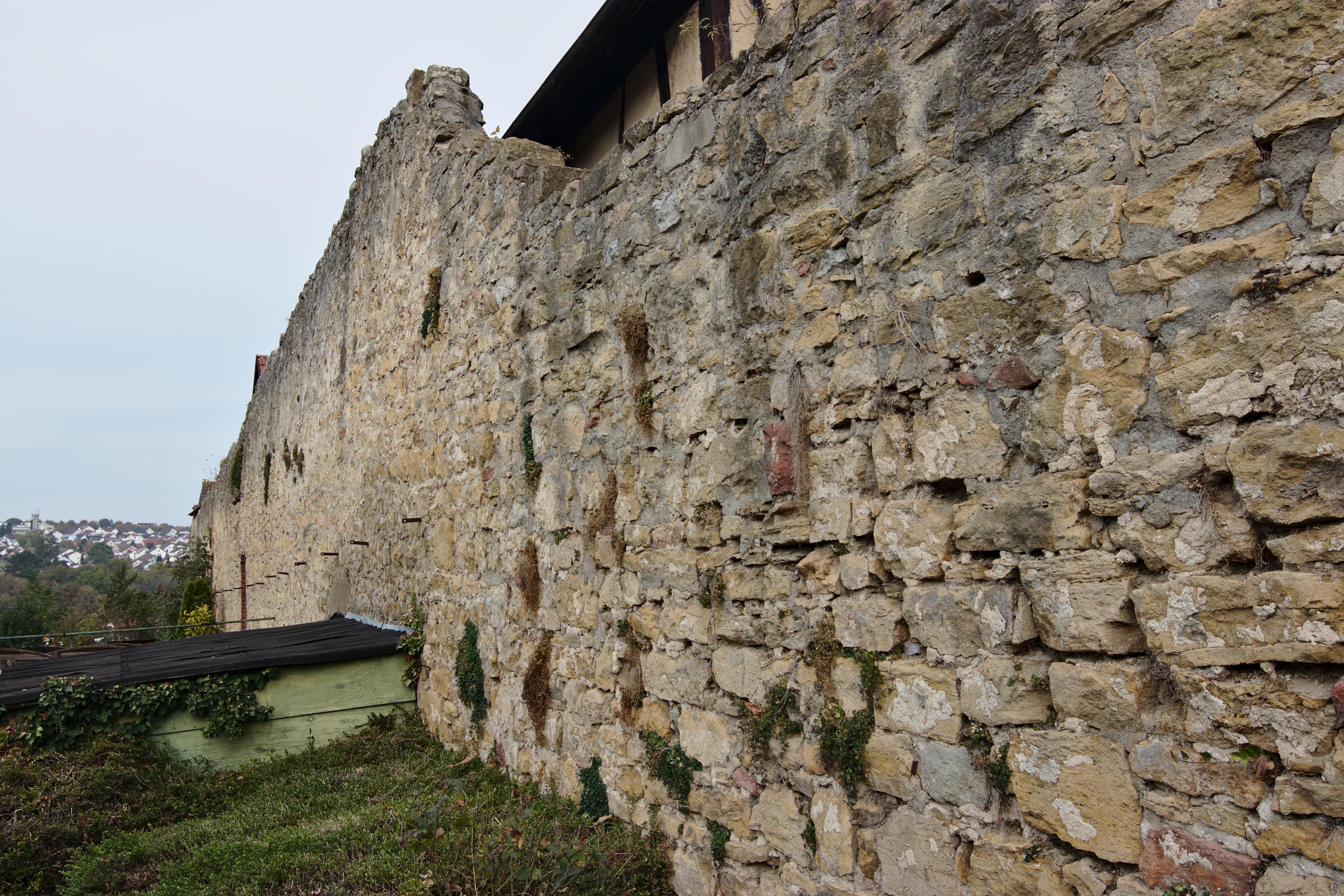 Teil der südlichen Stadtmauer von Marbach am Neckar.